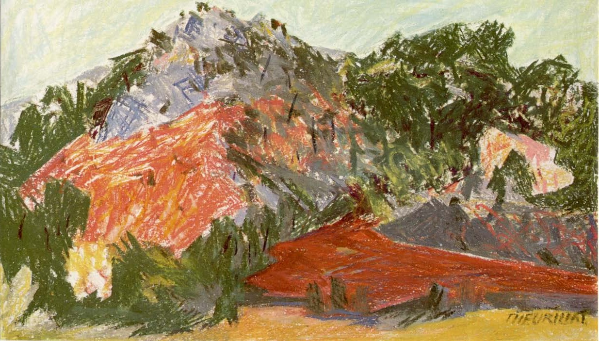 Vers Aix en Provence - 1965 cire 72x55cm RECHERCHE : Herbert Theurillat ne s'est pas contenté de pousser jusque dans leurs derniers retranchements ses recherches dans l'huile, il a trouvé dans une technique nouvelle, la Cire (craie grasse), un instrument très souple et chaleureux qui lui a permis de fixer, en quelques touches rapides prises sur le vif, des paysages admirables, notamment du Midi, de cette Provence d'inspiration inépuisable pour les peintres. Il y a là, des pages de toute beauté qui sont d'un grand artiste. extrait du livre "Le peintre Herbert Theurillat", des Editions Max Robert, Moutier"